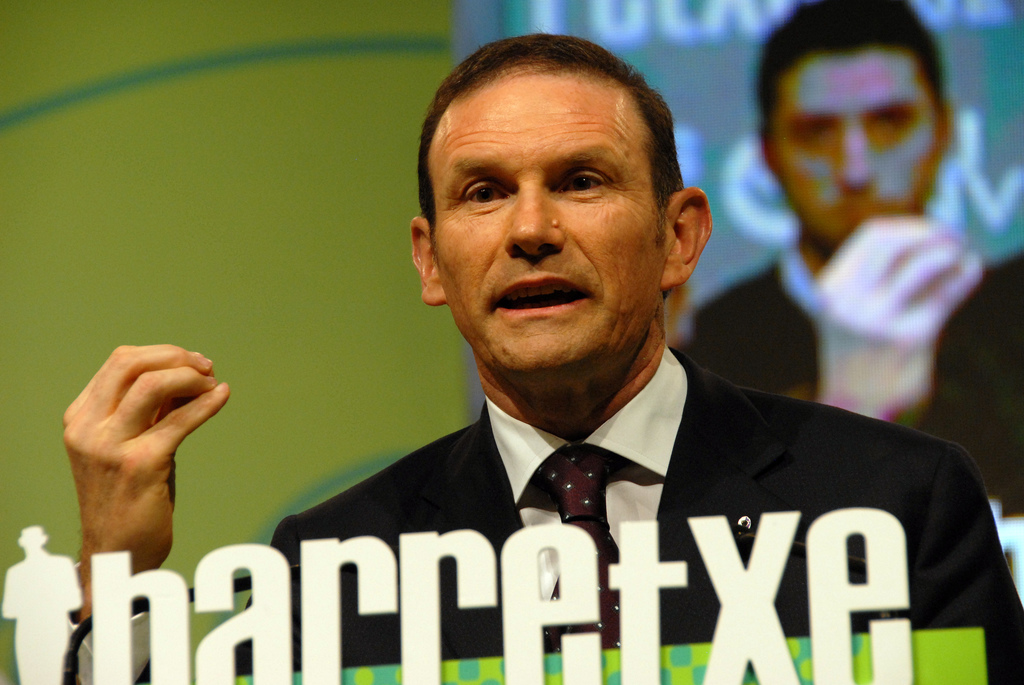 Juan Jose Ibarretxe en la campaña de las elecciones vascas de 2009 (25 de febrero).